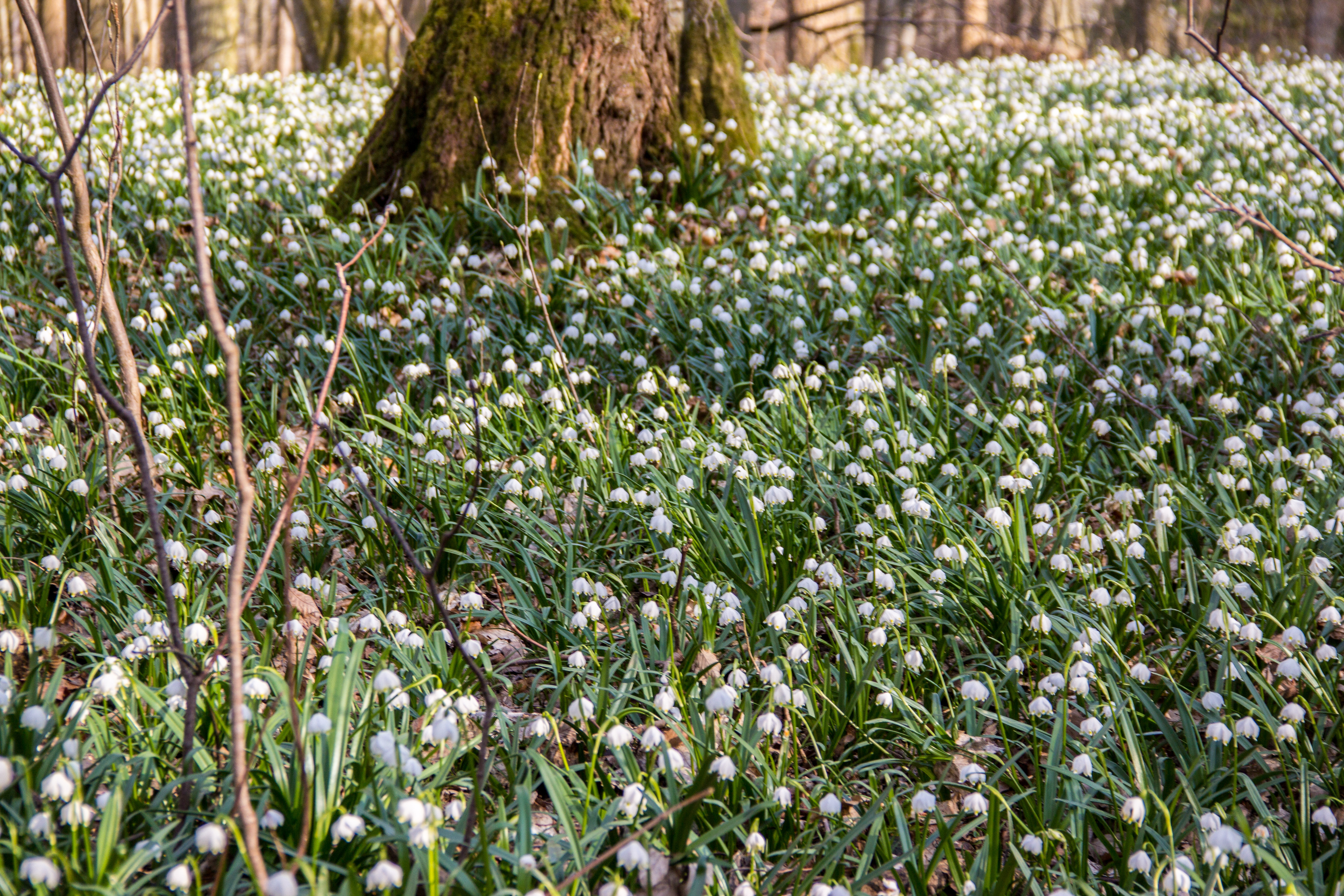 Märzenbecherwald, Naturschutzgebiet, Ettenstatt